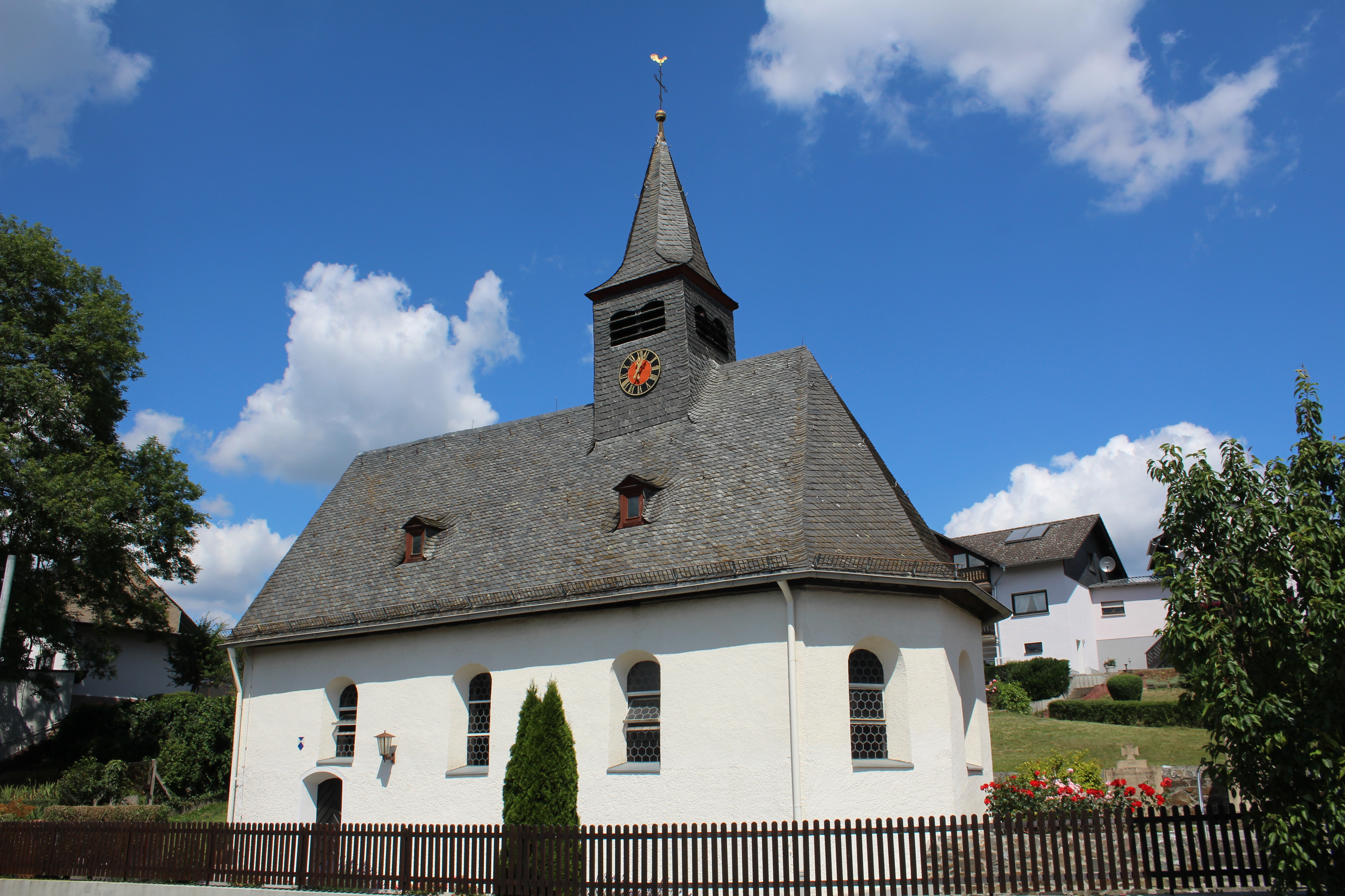 Evangelische Kirche Oberquembach, Gemeinde Schöffengrund, Hessen, Deutschland